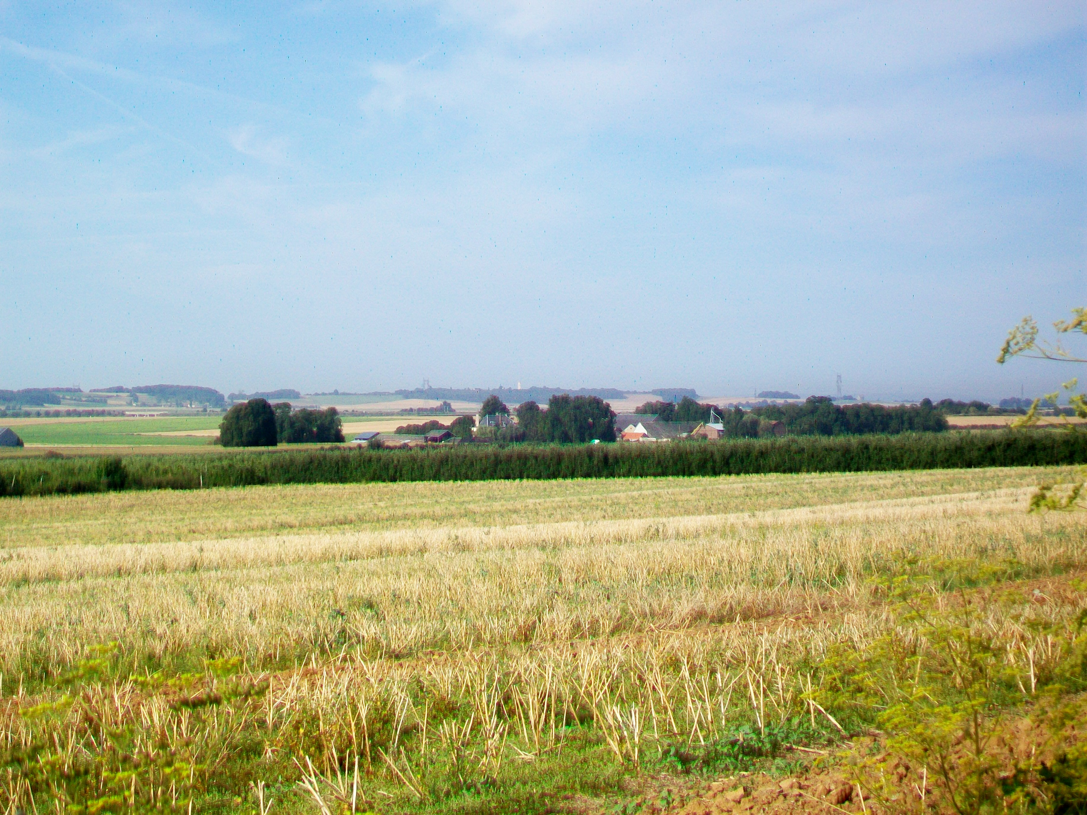 Vue sur la ferme de Beaurain depuis le nord-est.